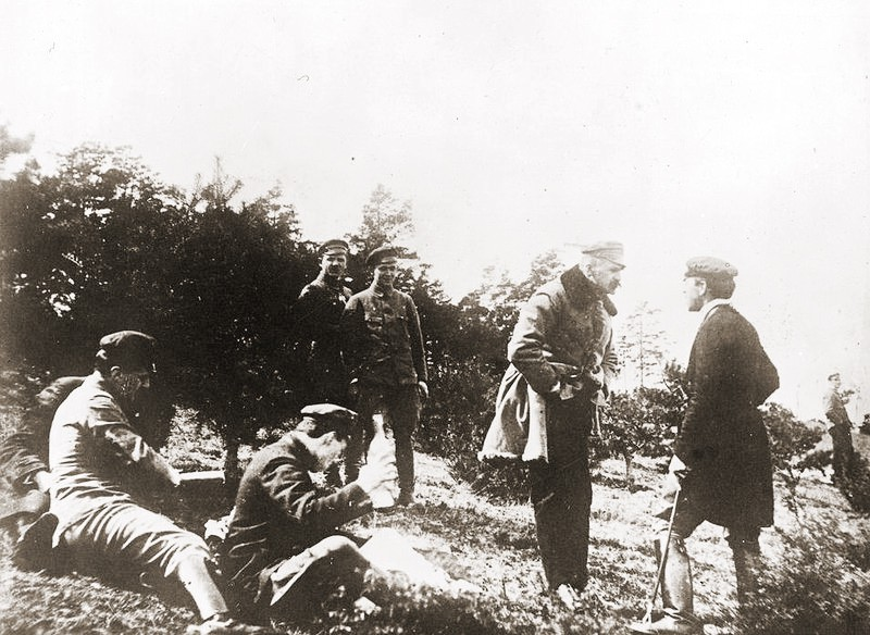 Ćwiczenia Polskiej Organizacji Wojskowej. Komendant Józef Piłsudski rozmawia z komendantem Szkoły Oficerskiej Henrykiem Krokiem-Paszkowskim. Na zdjęciu widoczni też (siedzą): Wojsznar-Opieliński i Bogusław Miedziński. Na dalszym planie: Władysław Horyd i Karol Krzewski-Lilienfeld.